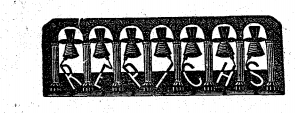 Capçalera d'una secció de Lo Torronyau